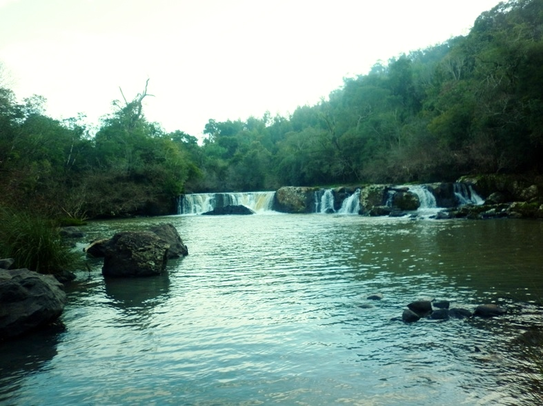 Salto Carpes en la localidad de Florentino Ameghino, Provincia de Misiones, Argentina. Fuenteː Periodista Horacio Cambeiro.